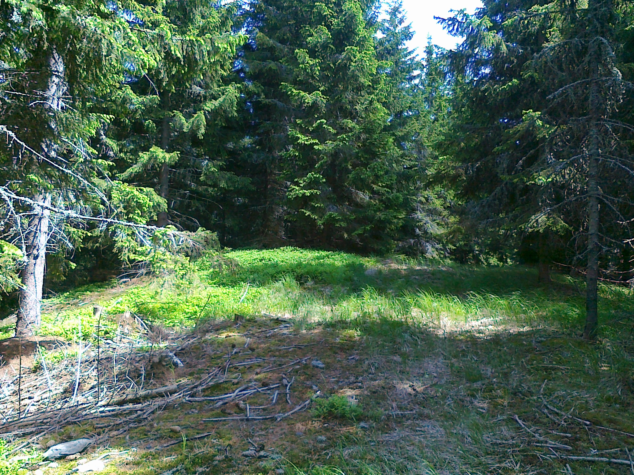 Szczyt góry Malý Máj - 1070 m n.p.m.